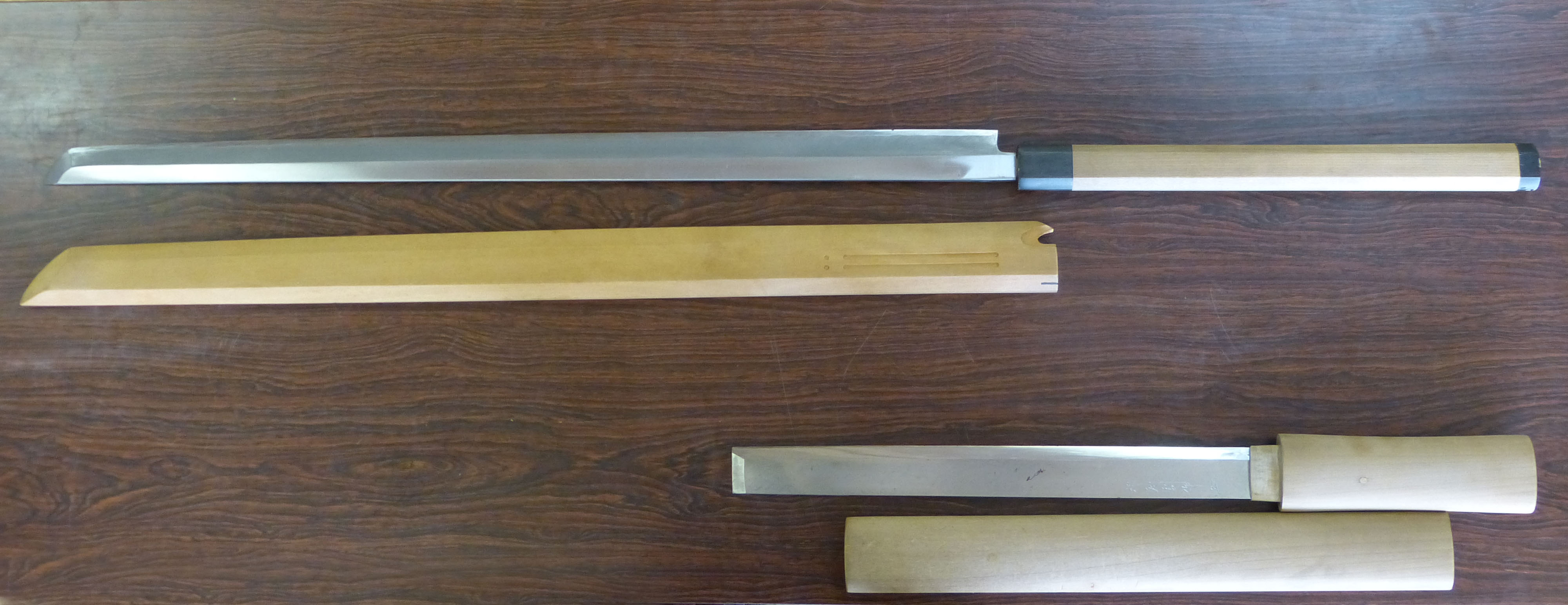 二半刃(相州刃)と額田刃（大草刃）